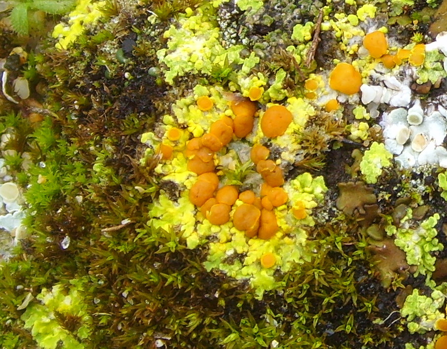 Fulgensia fulgens, dunes de Plouharnel (Morbihan, Bretagne, France)